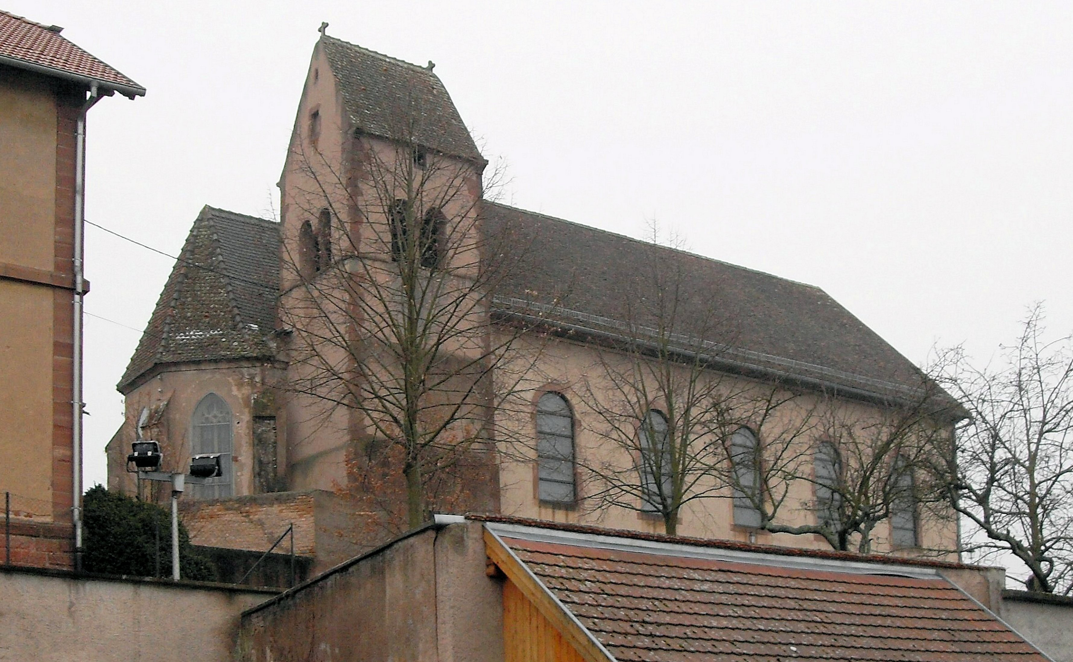 L'église Saint-Pancrace à Dangolsheim